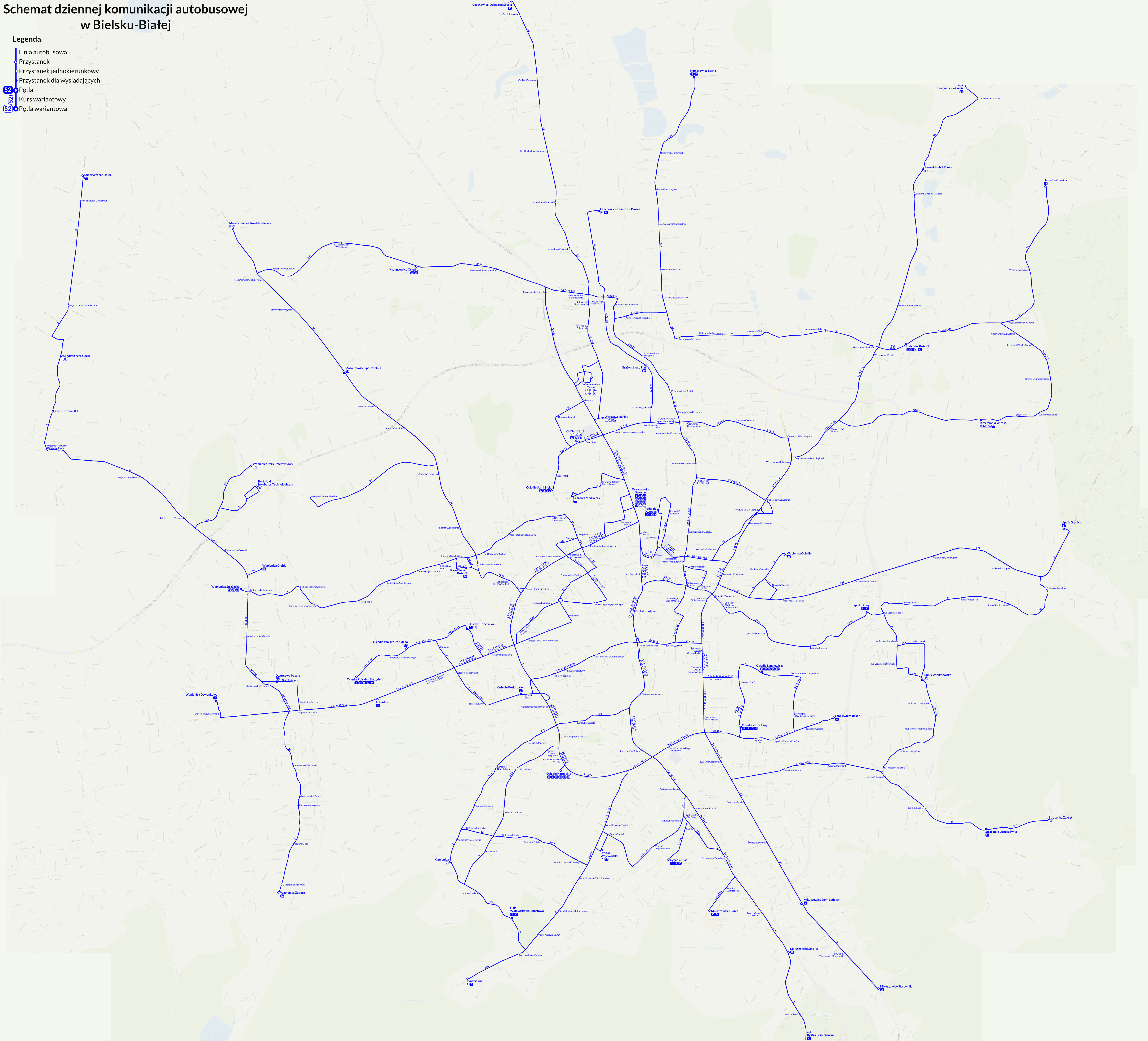 Schemat sieci autobusowej w Bielsku-Białej